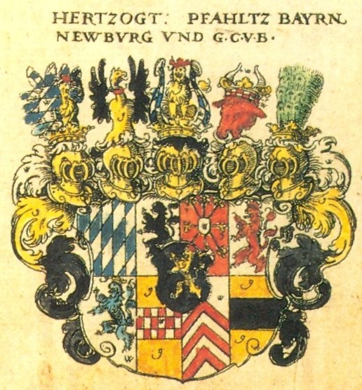 Wappen des Herzogtums Pfalz-Bayern